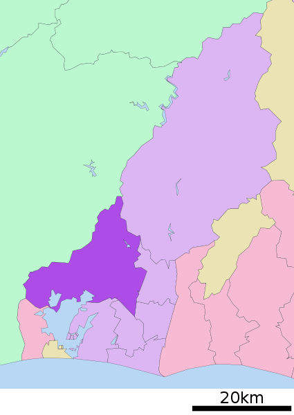 Location Map of Kita-ku, Hamamatsu